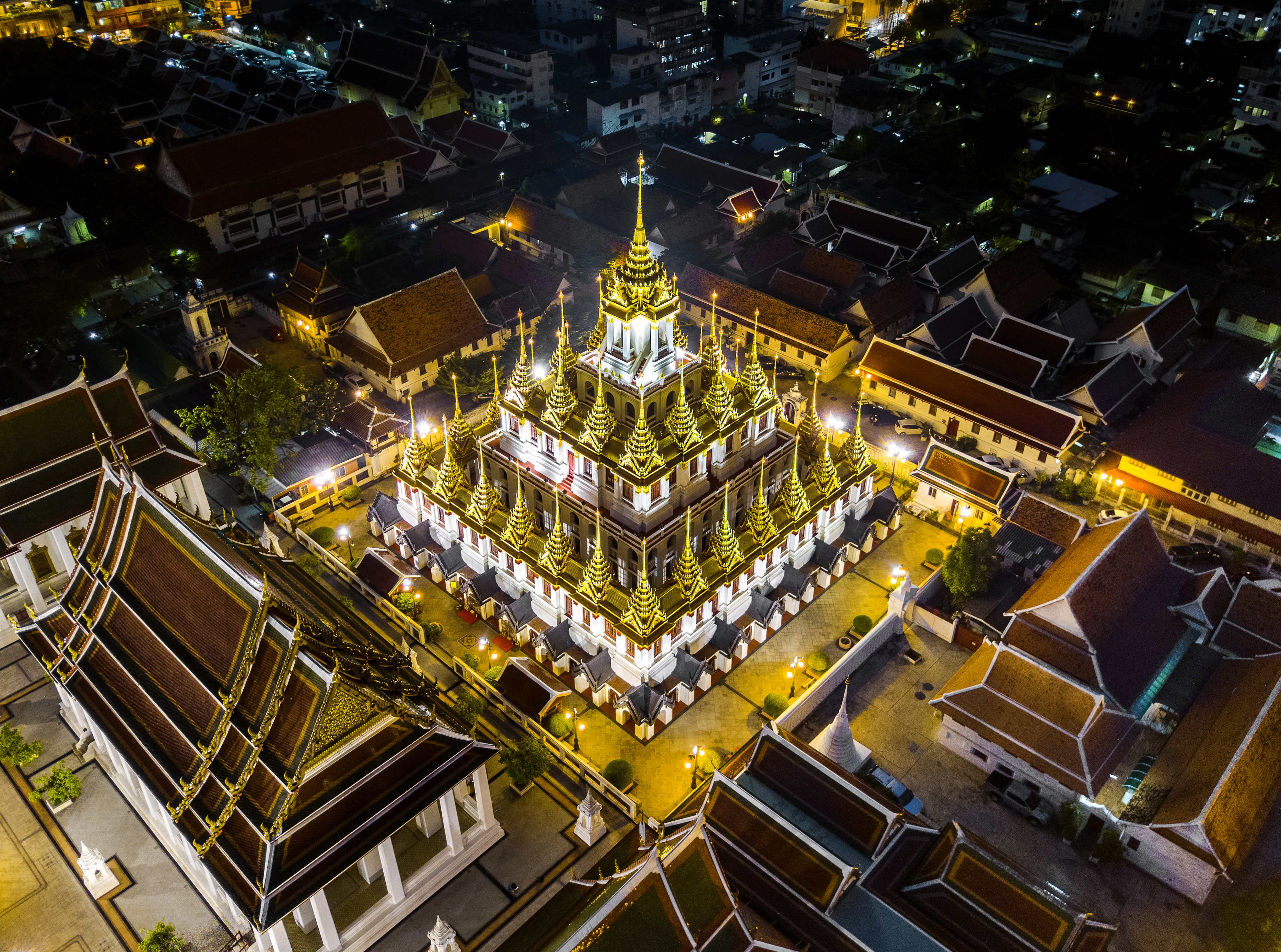 วัดราชนัดดาราม